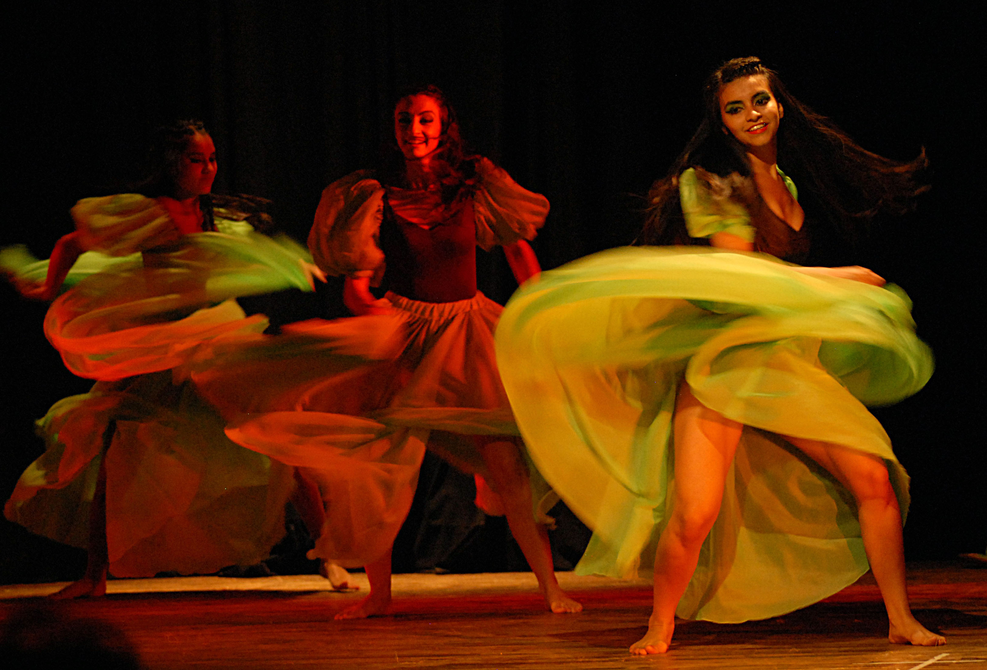 Galopa misionera bailada por artistas del Ballet "Guaynamérica Danza" de Marisil Ceccarini y Berenice Oliveira. Posadas, Provincia de Misiones, Argentina. Fuenteː Periodista Horacio Cambeiro.